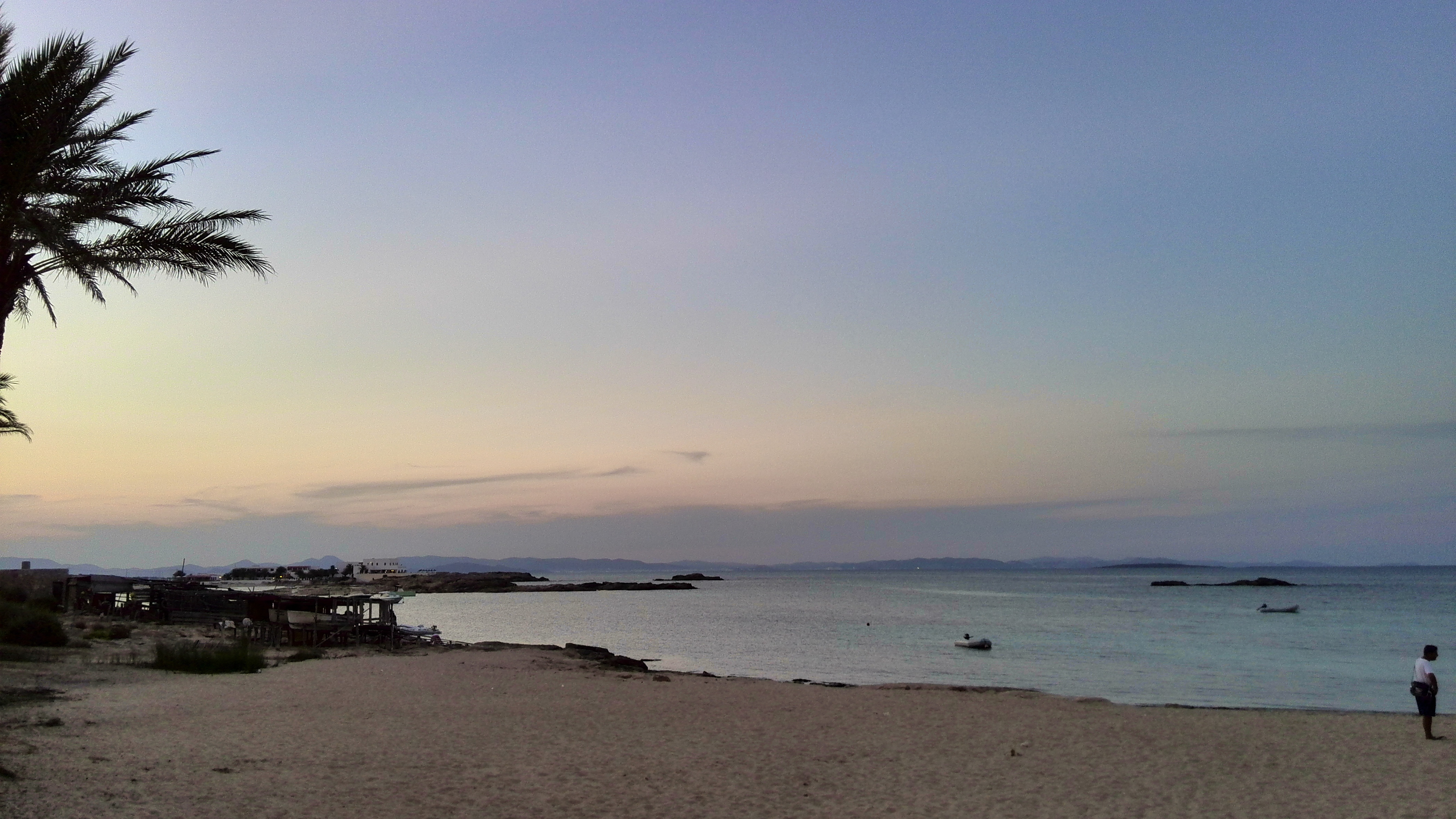 Es Pujols (Formentera) This is a a photo of a beach in the Balearic Islands, Spain, with id: PL-IB-86005